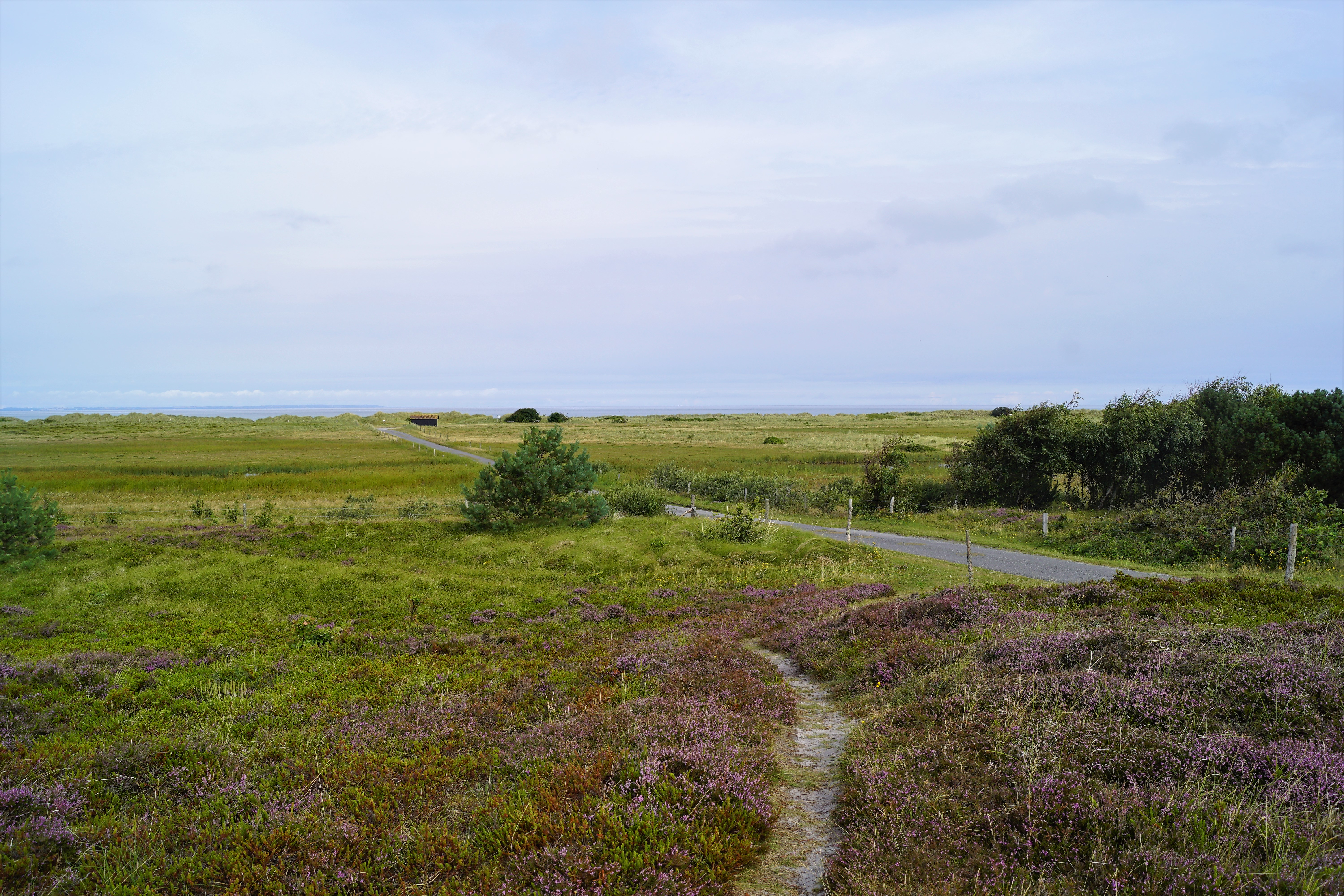 Overgangen mellem hede og strandeng